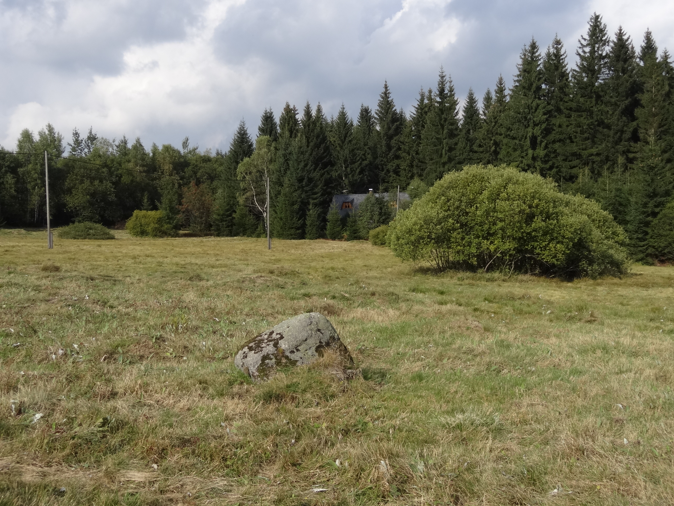 PP Tichá říčka v Jizerských horách chrání mokré až rašelinné louky, vlhké pcháčové louky, tužebníková lada, smilkové trávníky a lesní rašeliniště s výskytem zvláště chráněných druhů rostlin a živočichů.